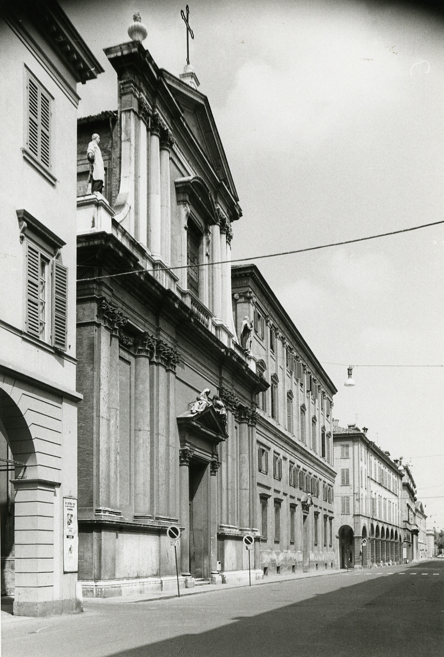 Servizio fotografico : Modena, Chiesa di San Vincenzo, Tribunale, Corso Canalgrande, 1973 / Paolo Monti. - Stampe: 7 : Positivo b/n, gelatina bromuro d'argento/ carta, 18x24. - ((Al verso delle stampe manoscritti i numeri dei negativi corrispondenti: 12428/29-29, 2435/30. Sul coperchio della scatola, manoscritto a pennarello: "Archit. Antica". - Occasione: Campagna di rilevamento del centro storico. - Fonte: Monografia di Orlandi, Piero: Modena: il censimento fotografico dei centri storici, Bologna, IBC (1979)